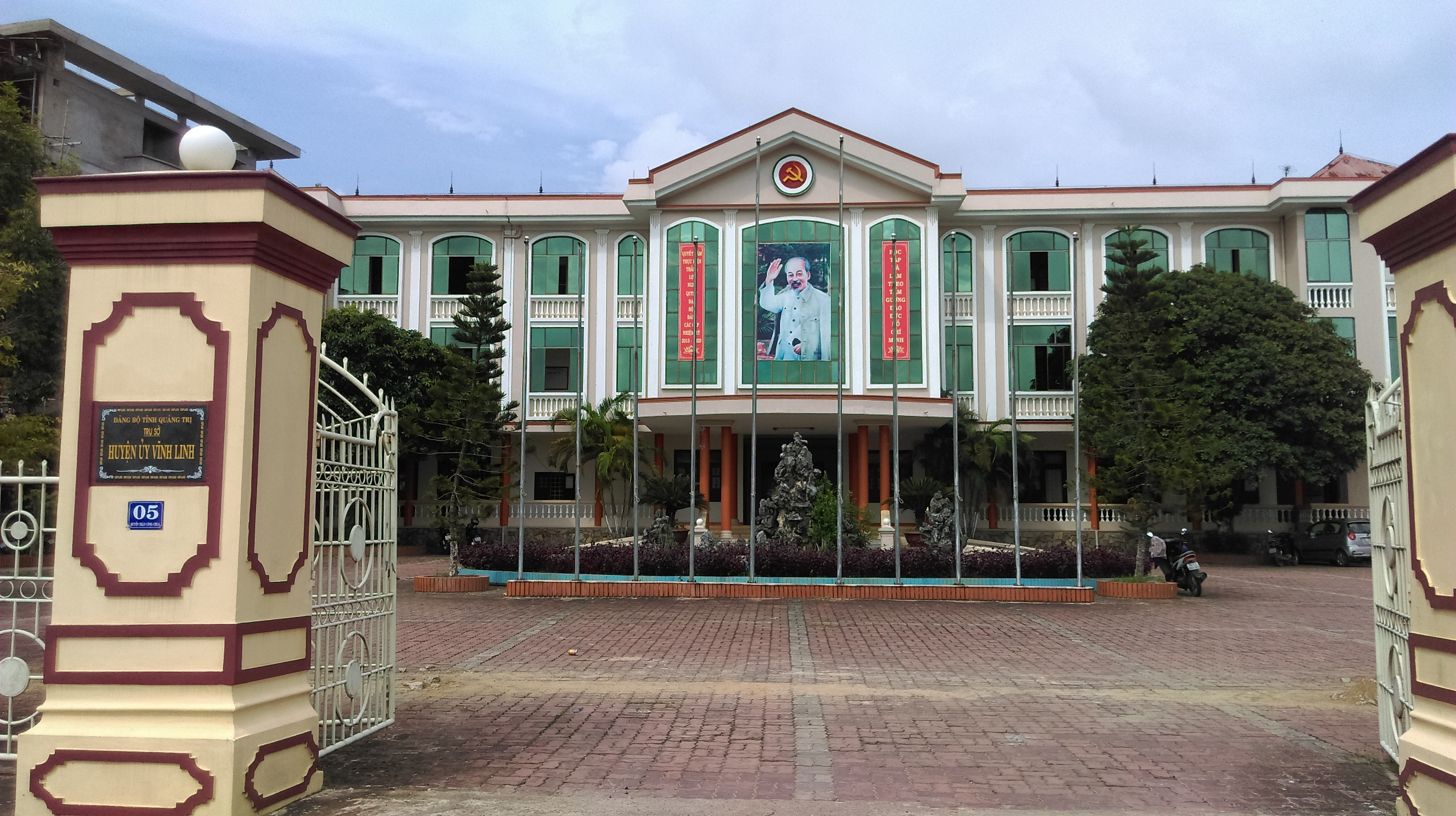 Huyện ủy Vĩnh Linh, Quảng Trị